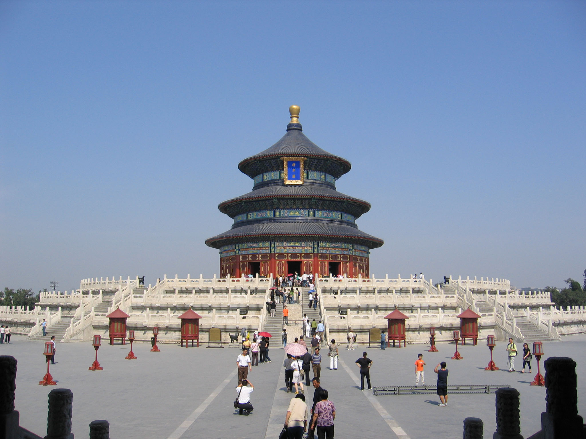 Az Ég temploma Pekingben